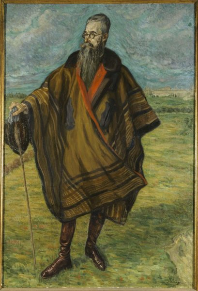 Ramón del Valle-Inclán.